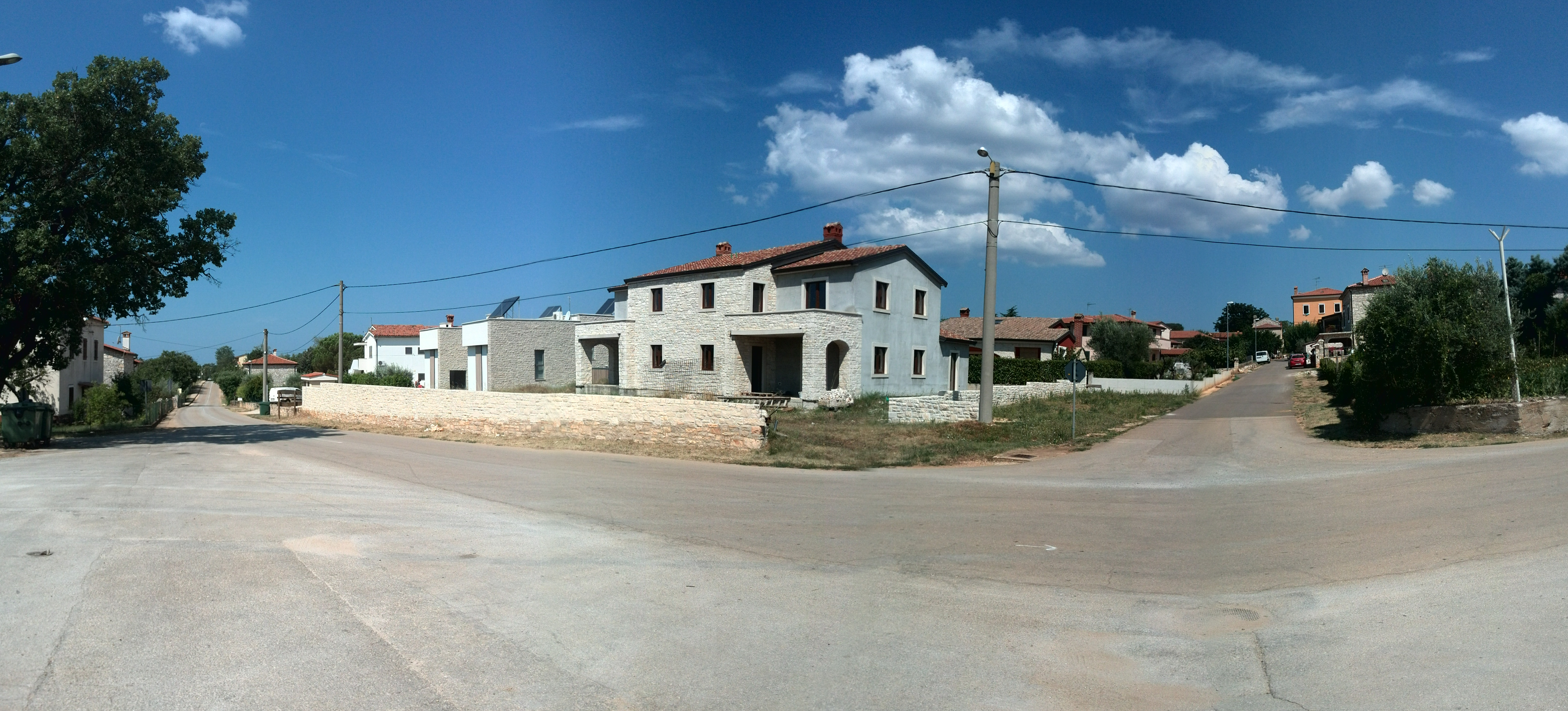 Village Fiorini in Istria, Croatia